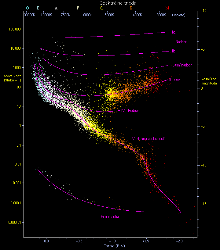 farebná verzia HR diagramu Originál Hertzsprung-Russell diagram Richard Powell.png vytvorený redaktorom Deglr6328. (Neskôr ho nahradil sk::en:Image:Hertzsprung-Russell_diagram_Richard_Powell.png)